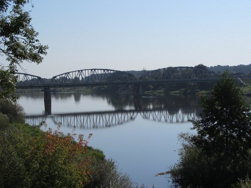 Масты Правыя Мост